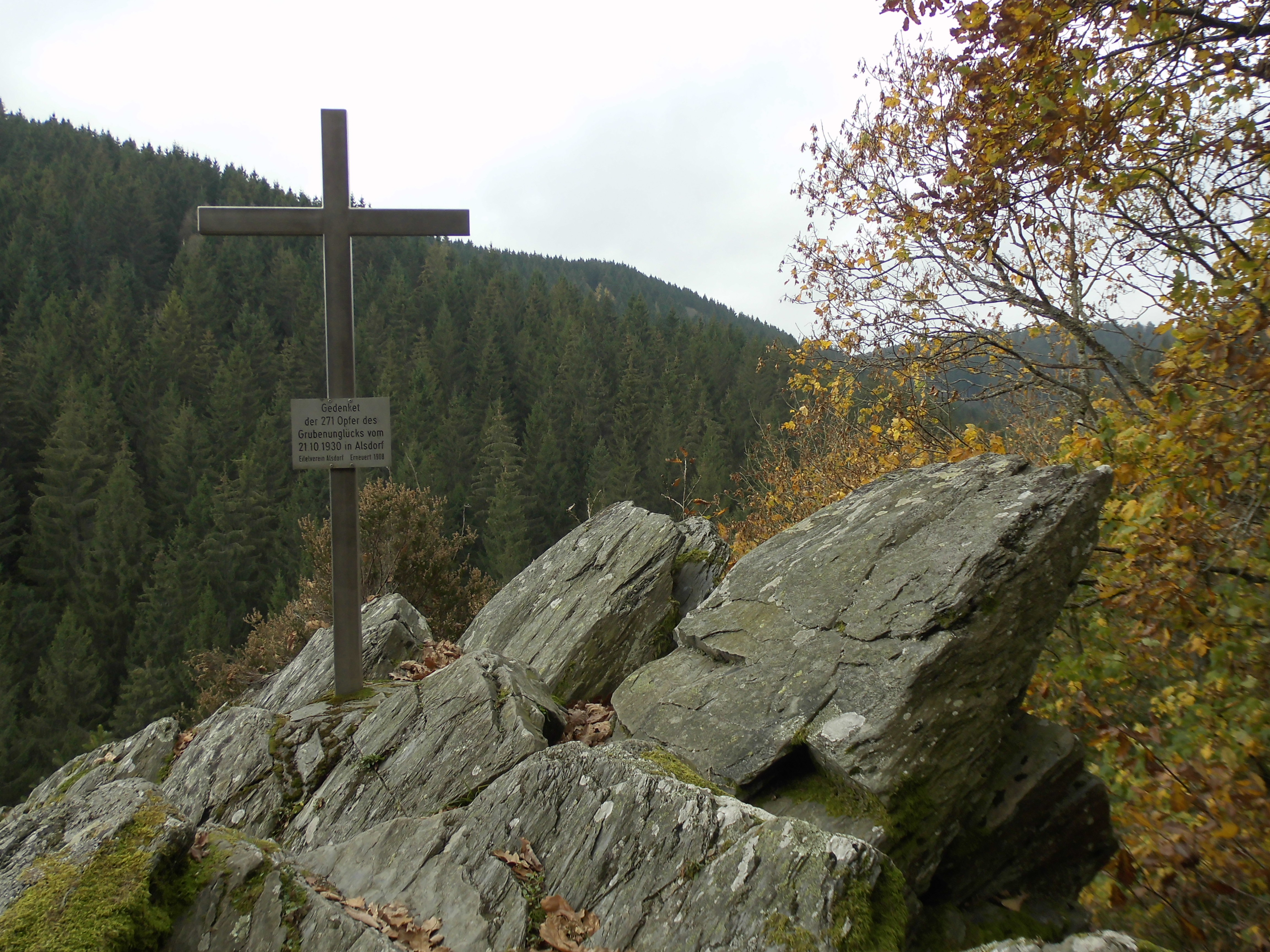 Das Kreuz auf der Felsformation am "Eifelblick", nah bei Eicherscheid in der Eifel